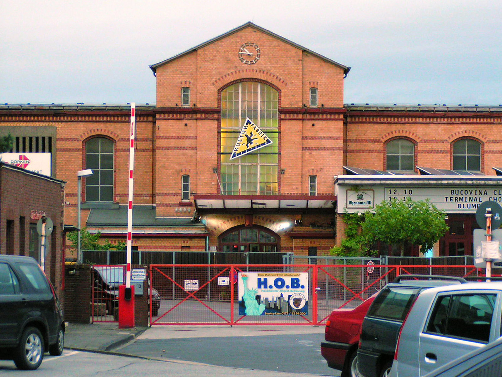 Außenansicht der KuFa, Veranstaltungszentrum Kulturfabrik Krefeld : Exterior view of the art center "Kulturfabrik Krefeld", called KuFa Source: own work Date: Oct 20, 2007, Krefeld, Germany Author: Maschinenjunge Licence: GFDL, cc-by 3.0